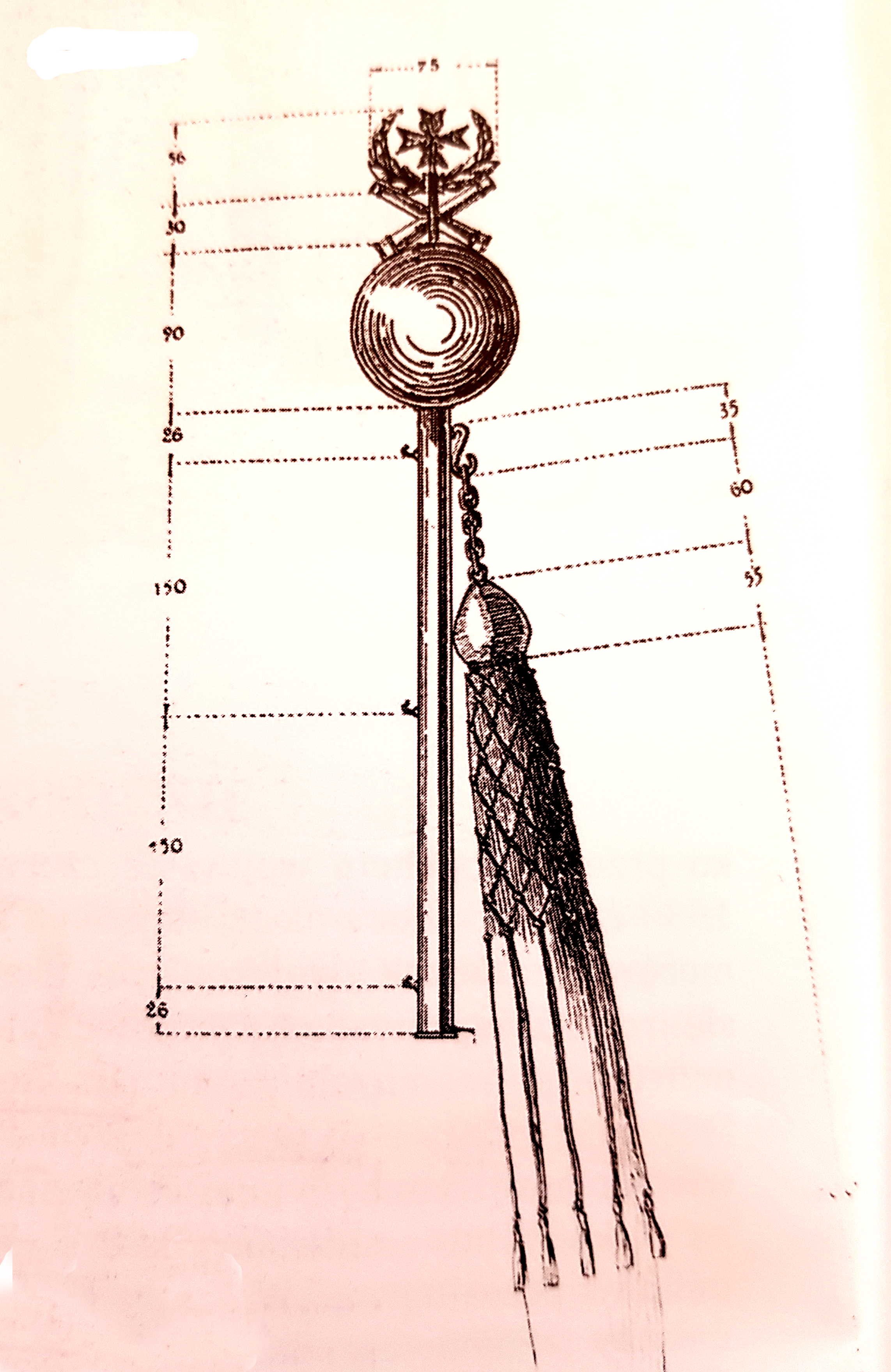 Buńczuk - artyleria